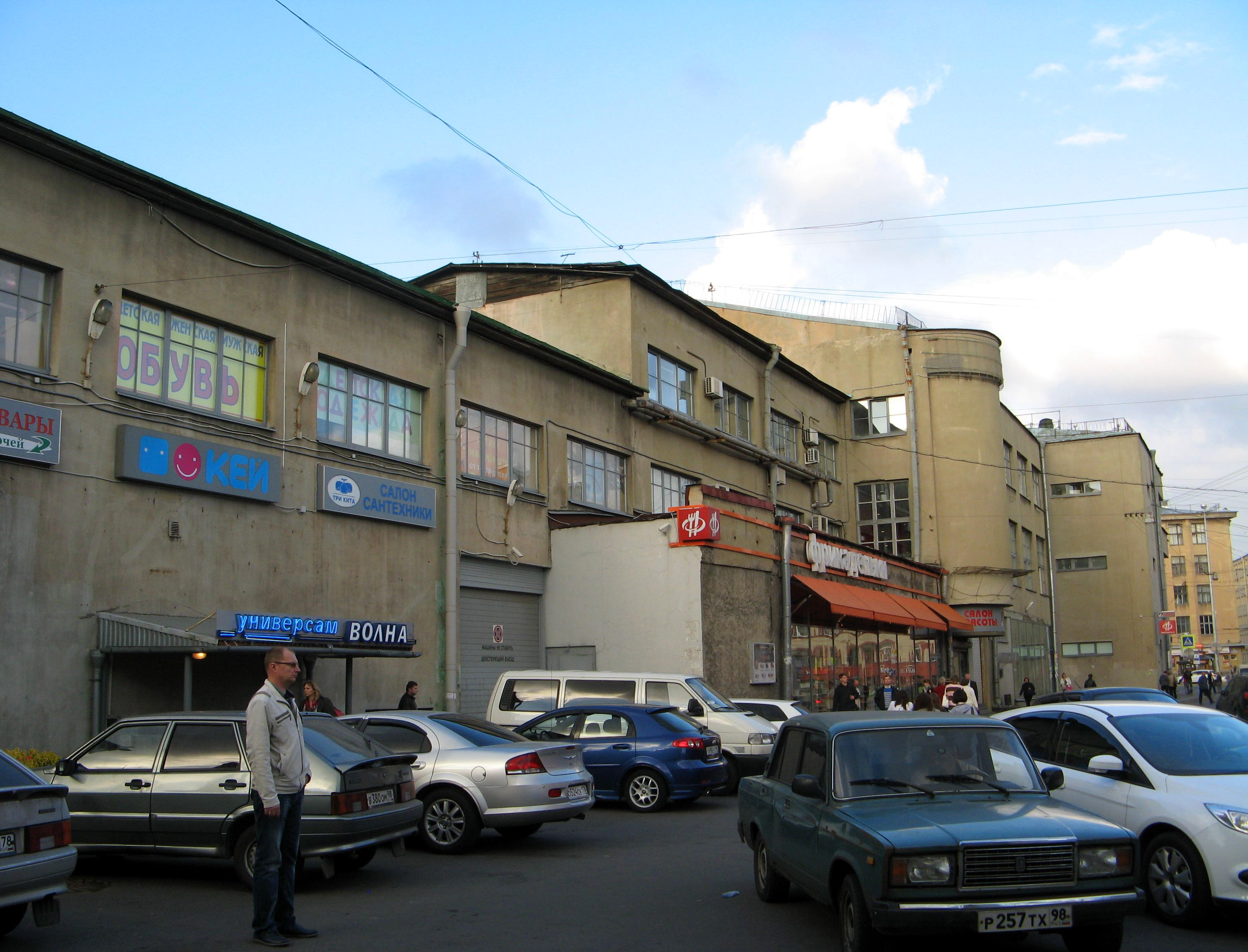 Универмаг и фабрика-кухня Кировского района (Санкт-Петербург, площадь Стачек, 9, Промышленная улица, 3)